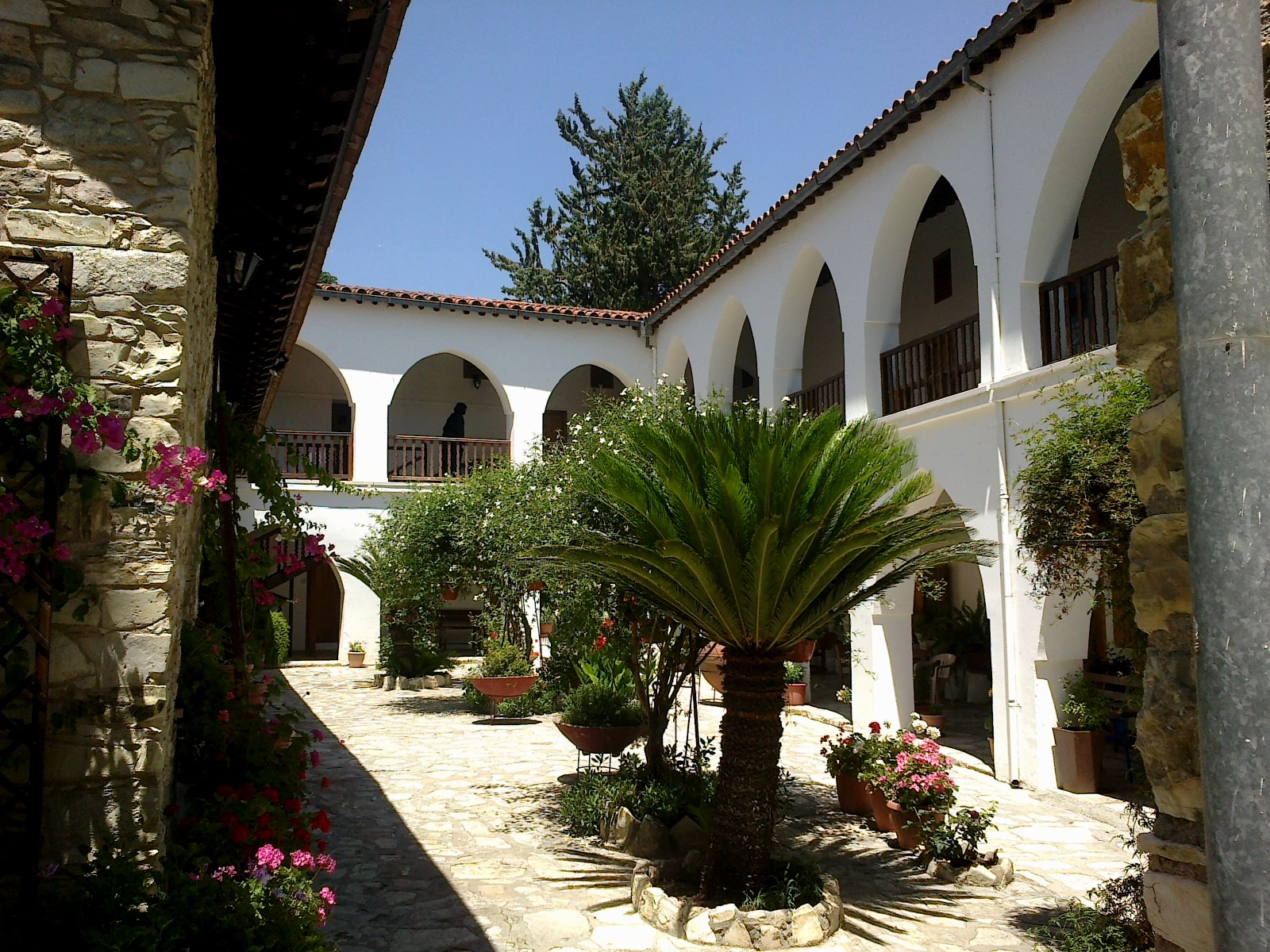 Chypre Agios Minas Monastere Cloitre